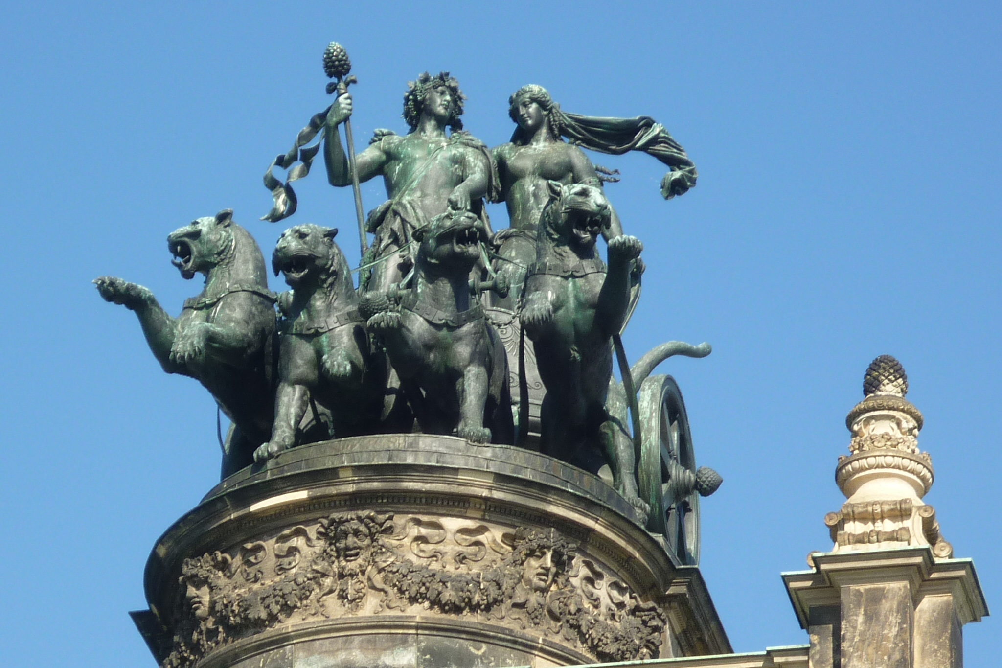 Pantherquadriga über der Exedra der Semperoper in Dresden